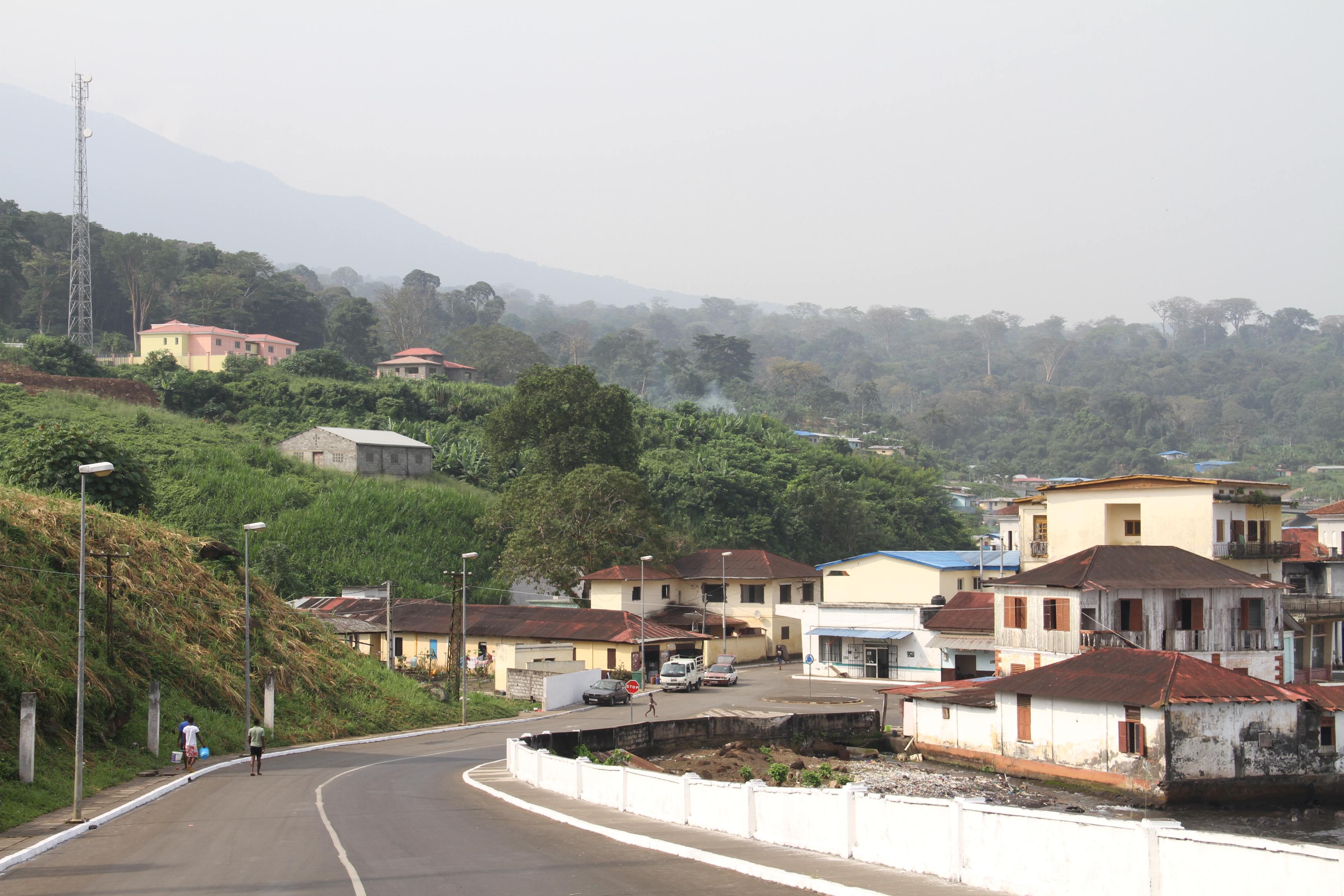 Ansicht von Luba The making of this document was supported by the Community-Budget of Wikimedia Germany.